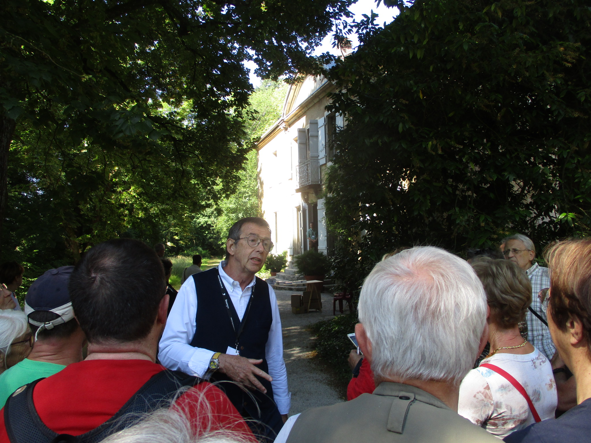 Maison de Colette à Besançon, présentée le jour de l’inauguration par Lionel Estavoyer (historien d'art de Besançon, écrivain, et conseiller pour le patrimoine de la mairie de Besançon)